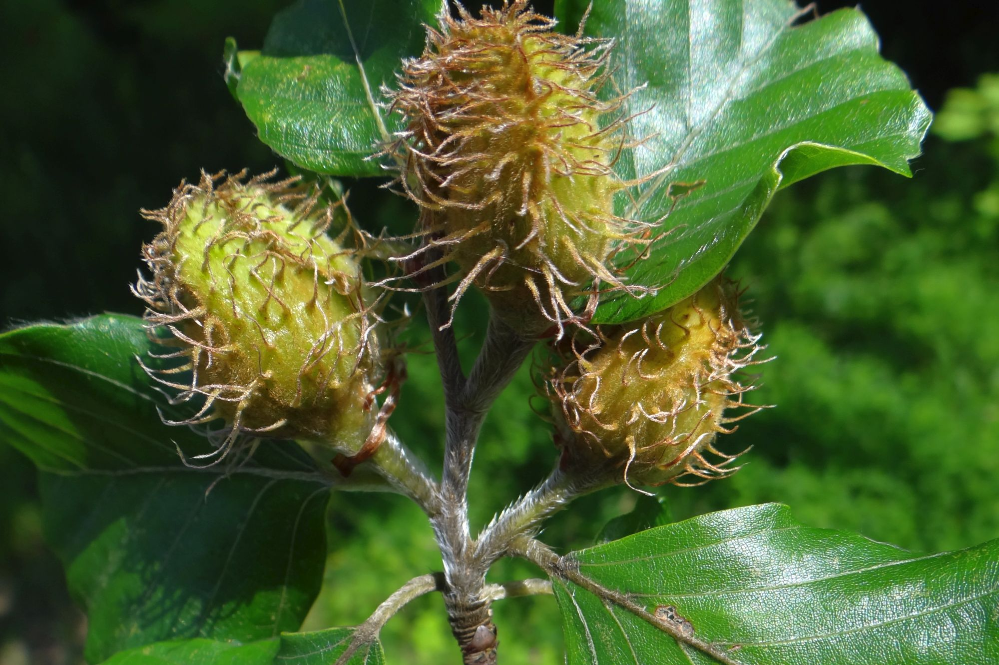 Fagus sylvatica